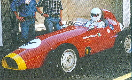 Bandini formula junior, driver Ugo Piccagli, Montecarlo